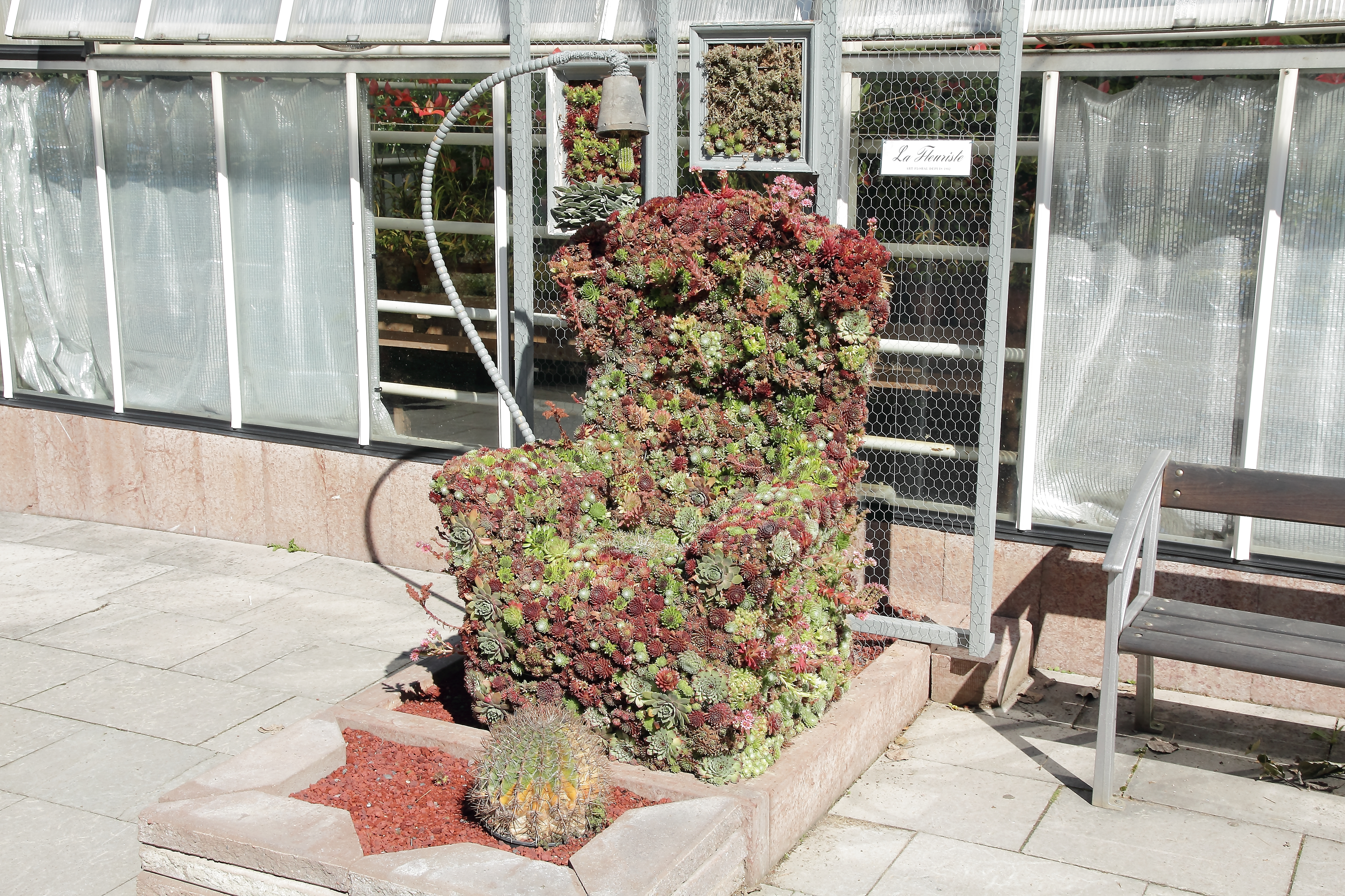 Göteborgs Botaniska Trädgård.